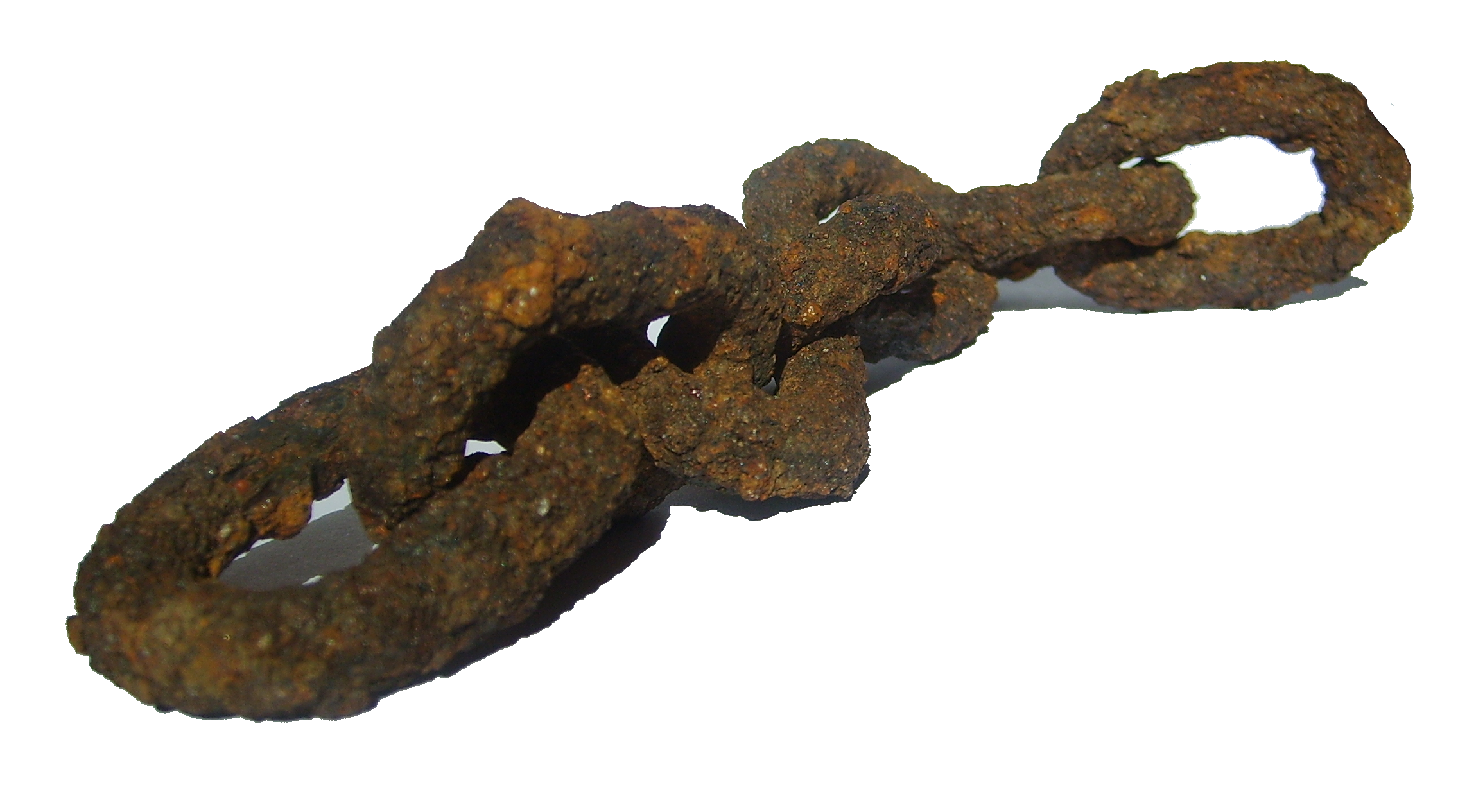 Chaine rouillée